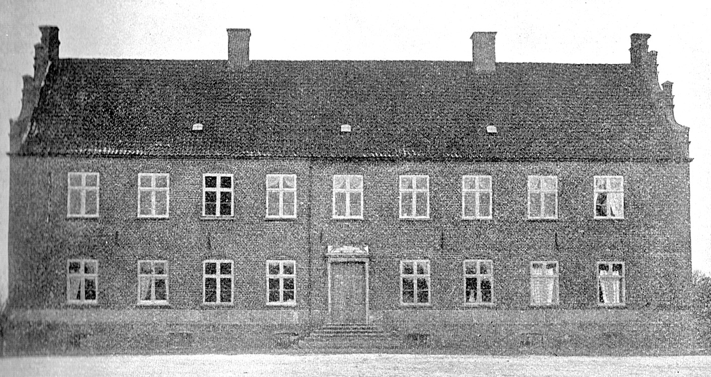 Skjoldemose er en gammel sædegård, den nævnes første gang i 1475. Gården ligger i Stenstrup Sogn, Sunds Herred, Egebjerg Kommune. Hovedbygningen er opført i 1662 og ombygget i 1916.